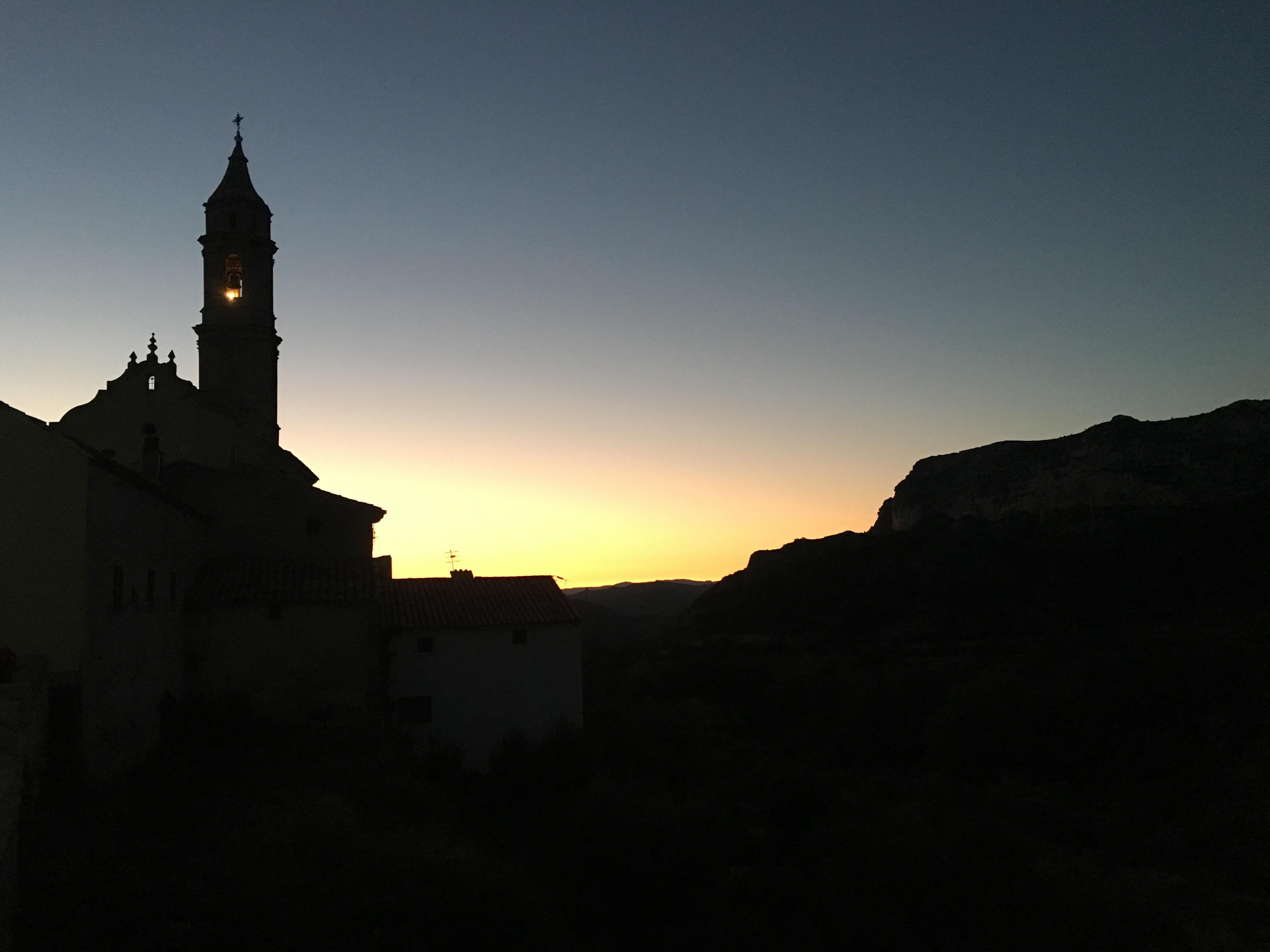 La luz del campanario ilumina el amanecer en Seno